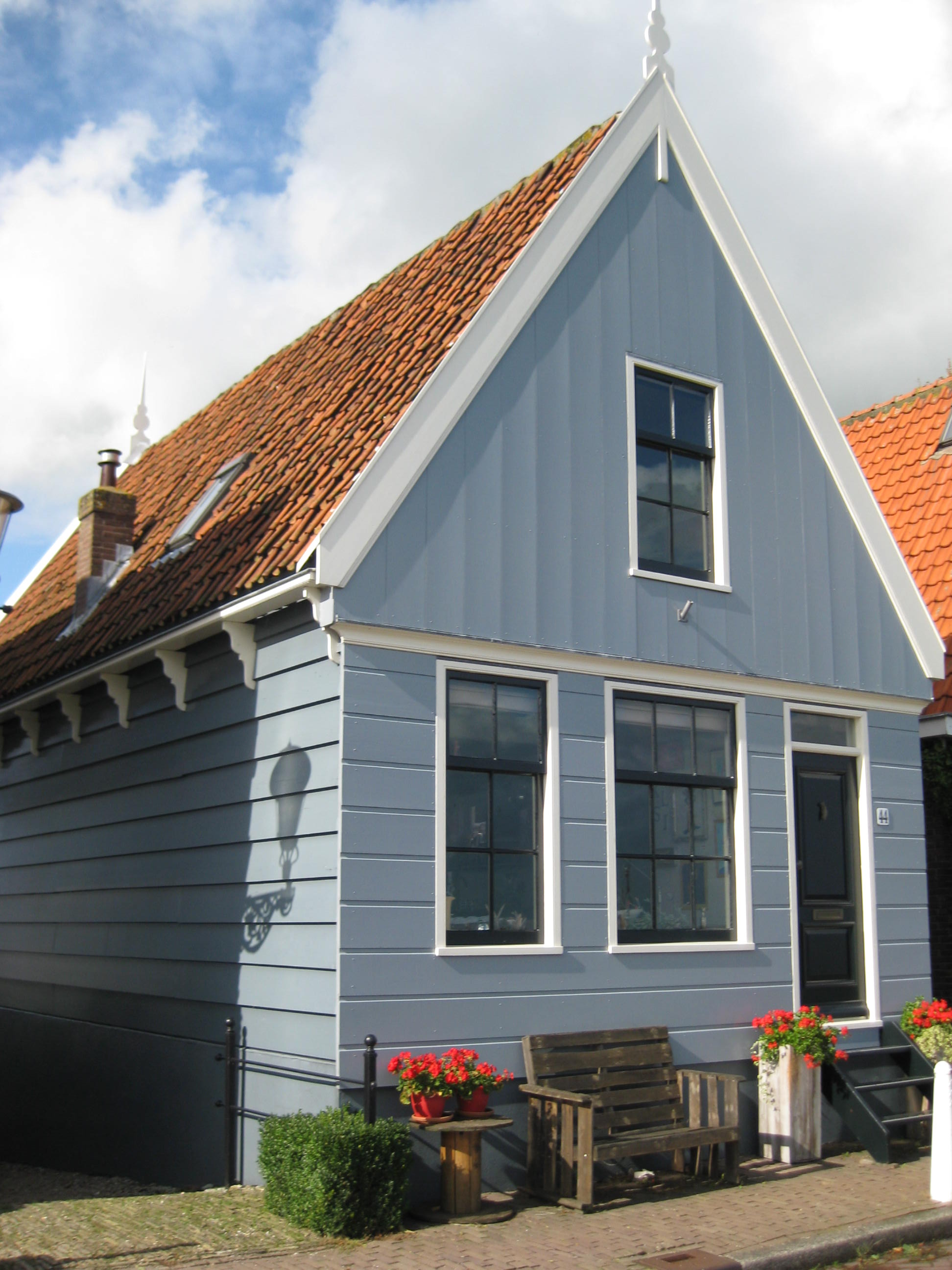 Durgerdammerdijk 44, Amsterdam-Noord